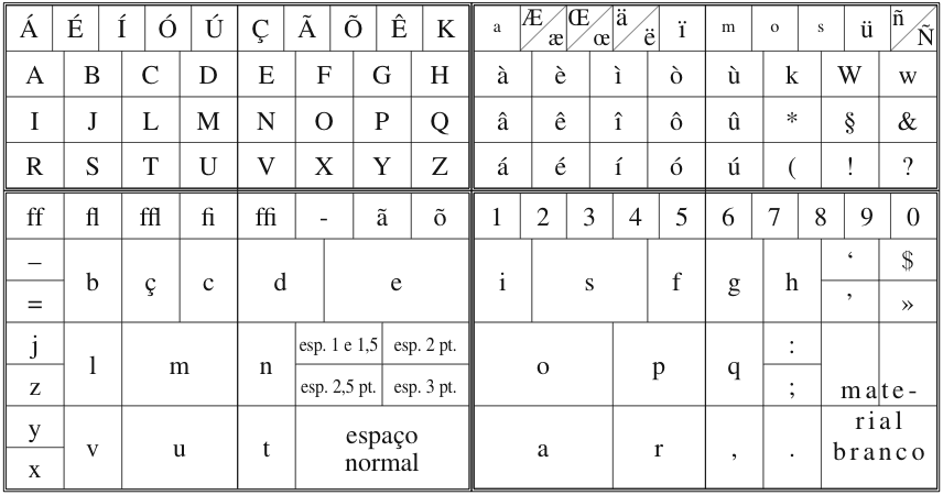 Esquema, desenhado por mim, de uma caixa de tipos utilizada em tipografias portuguesas.A base para o desenho foi a observação de gravura antiga, com correcções introduzidas com a ajuda de um ex-tipógrafo.